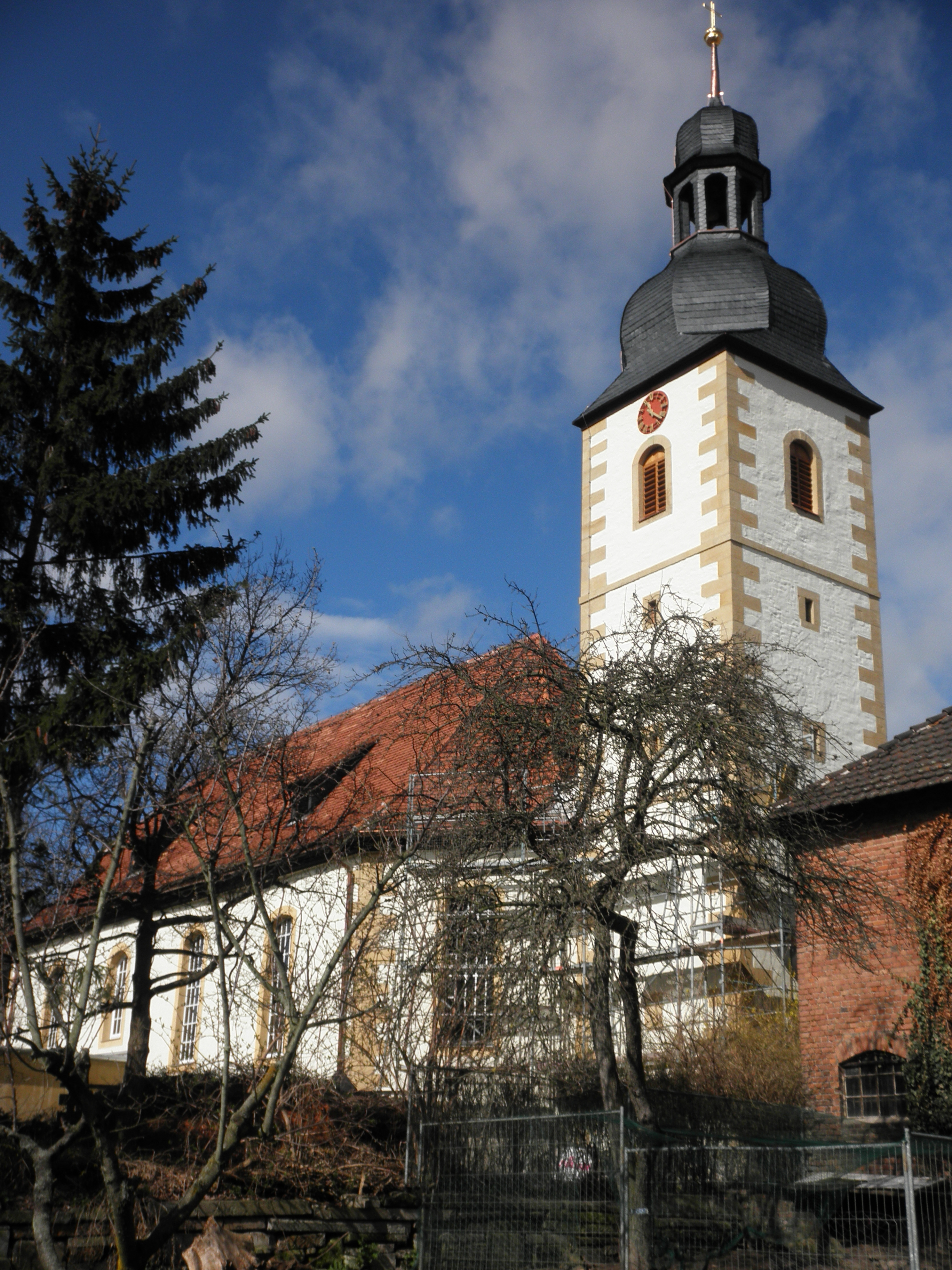 Bonifatiuskirche Hochheim